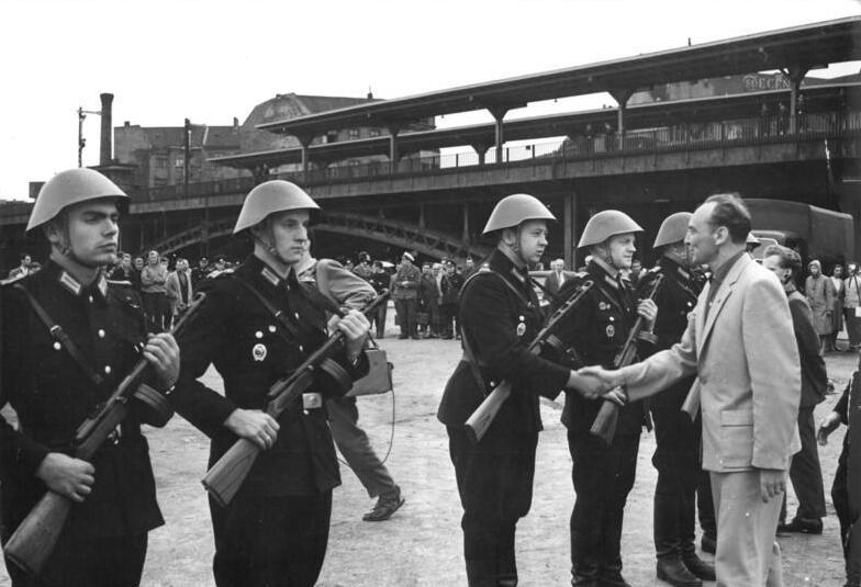 ADN-ZB-Krisch-Berlin: Sicherung der Staatsgrenze am 13.8.1961. Der 1. Sekretär des Zentralrates der FDJ, Horst Schumann, zeichnete am 19.8.1961 vor dem Bahnhof Friedrichstaße verdiente Genossen der Transportpolizei aus. Die Einsatzgruppe der VP-Meisters Karl Schwawe erhielt die Ehrenurkunde des Zentralrates der FDJ. Veröffentlichtung nur mit Genehmigung der Pressestelle des MDI